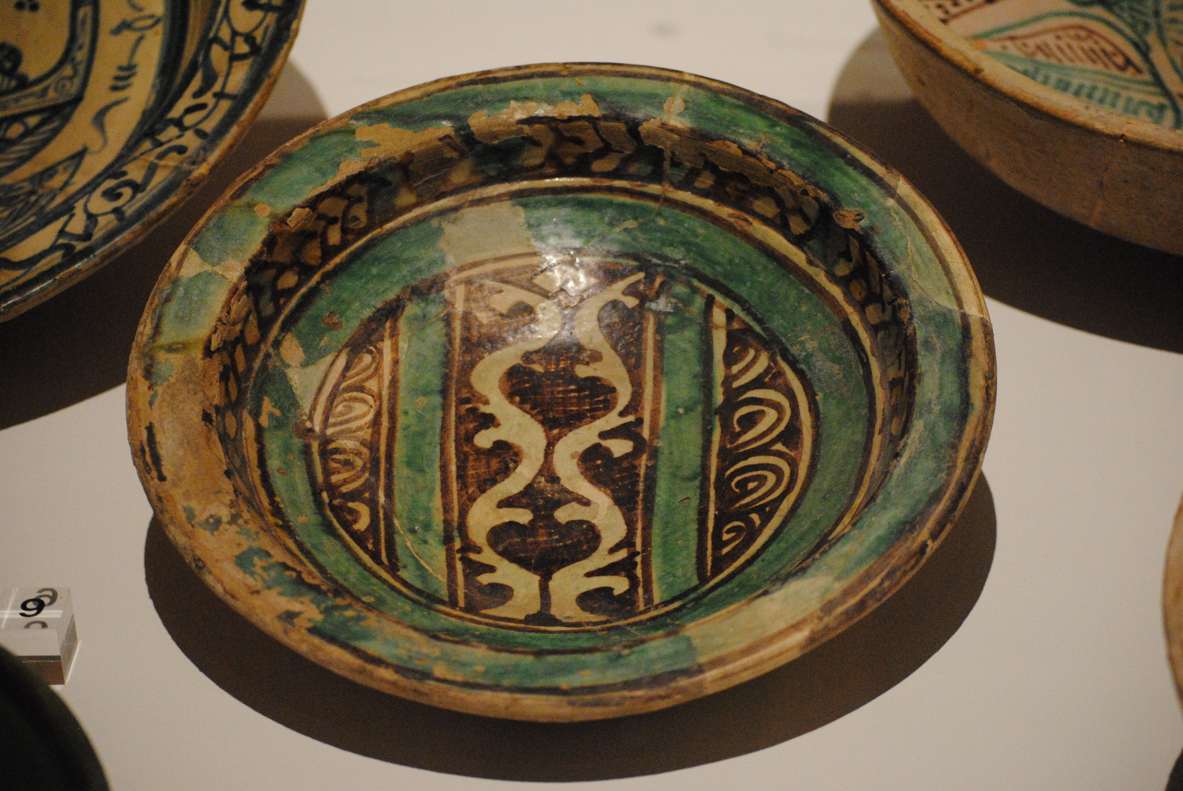 Catino invetriato policromo usato come bacino ceramico - importato dalla Tunisa, risalente alla seconda metà dell'XI secolo (chiesa di San Sisto, Pisa) - Museo nazionale di San Matteo.